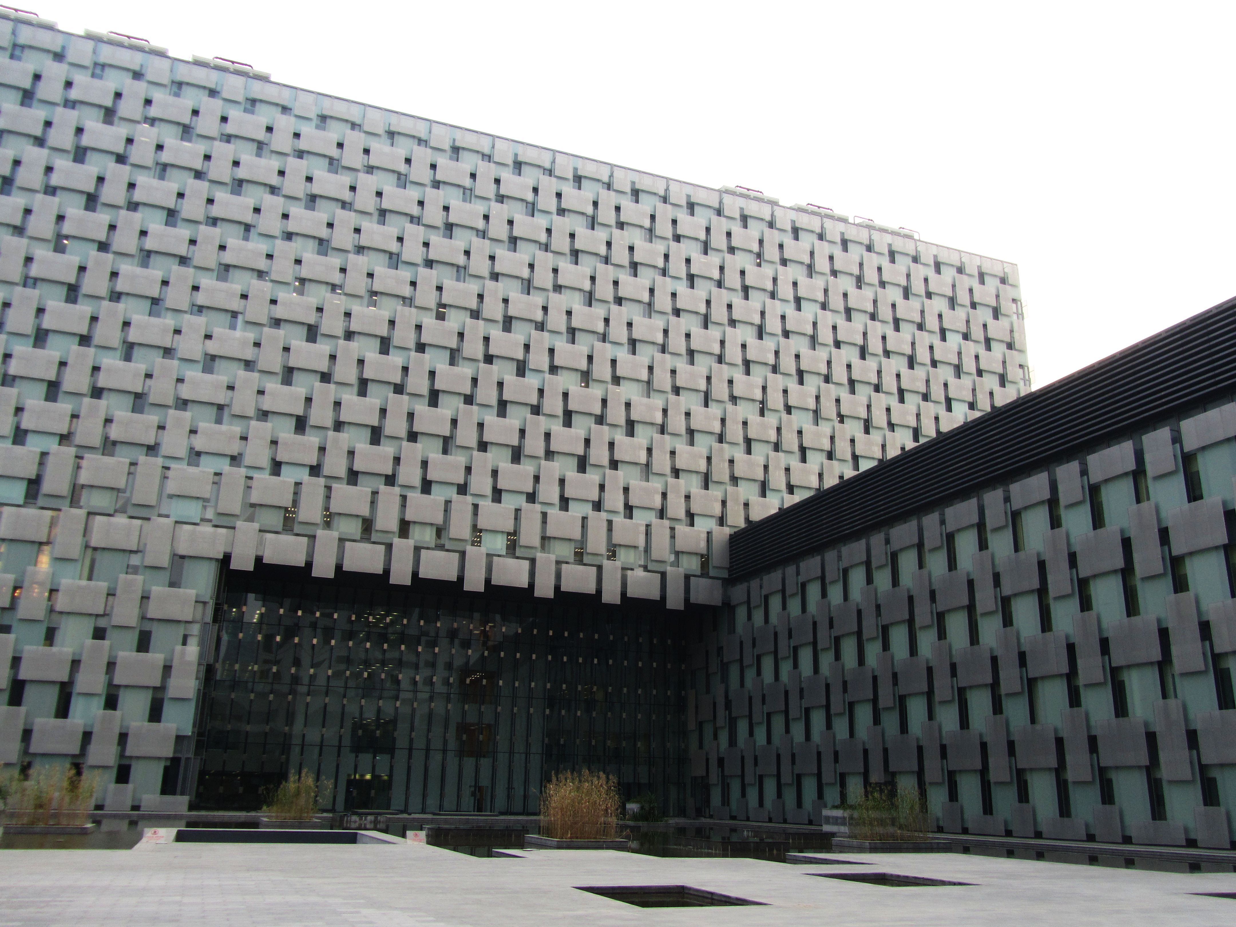 鼓楼医院三期建筑，即其南扩工程，此为北侧庭院。